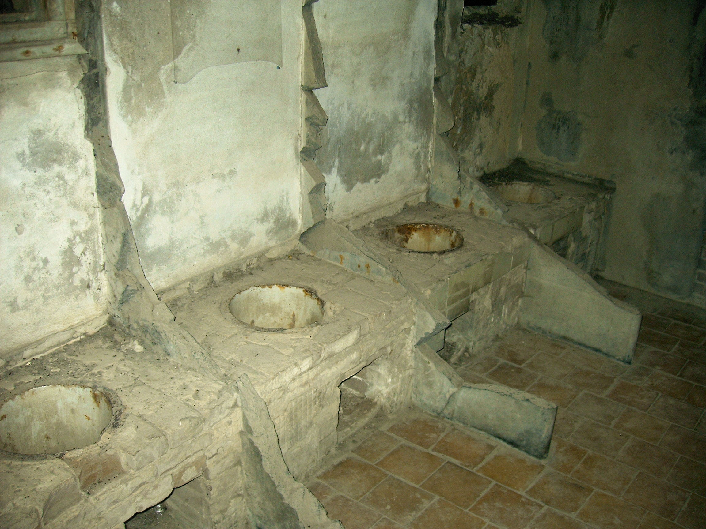 Fort Pampus: De orginele wc gevestigd in de binnenring. Deze moesten gebruikt worden door 150 man en waren de enige in de binnenring.